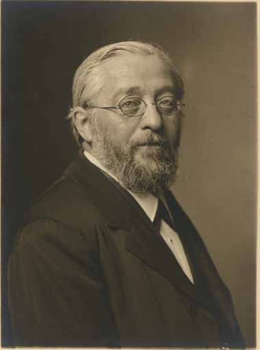 Retrato del mineralogista alemán Paul Heinrich von Groth.